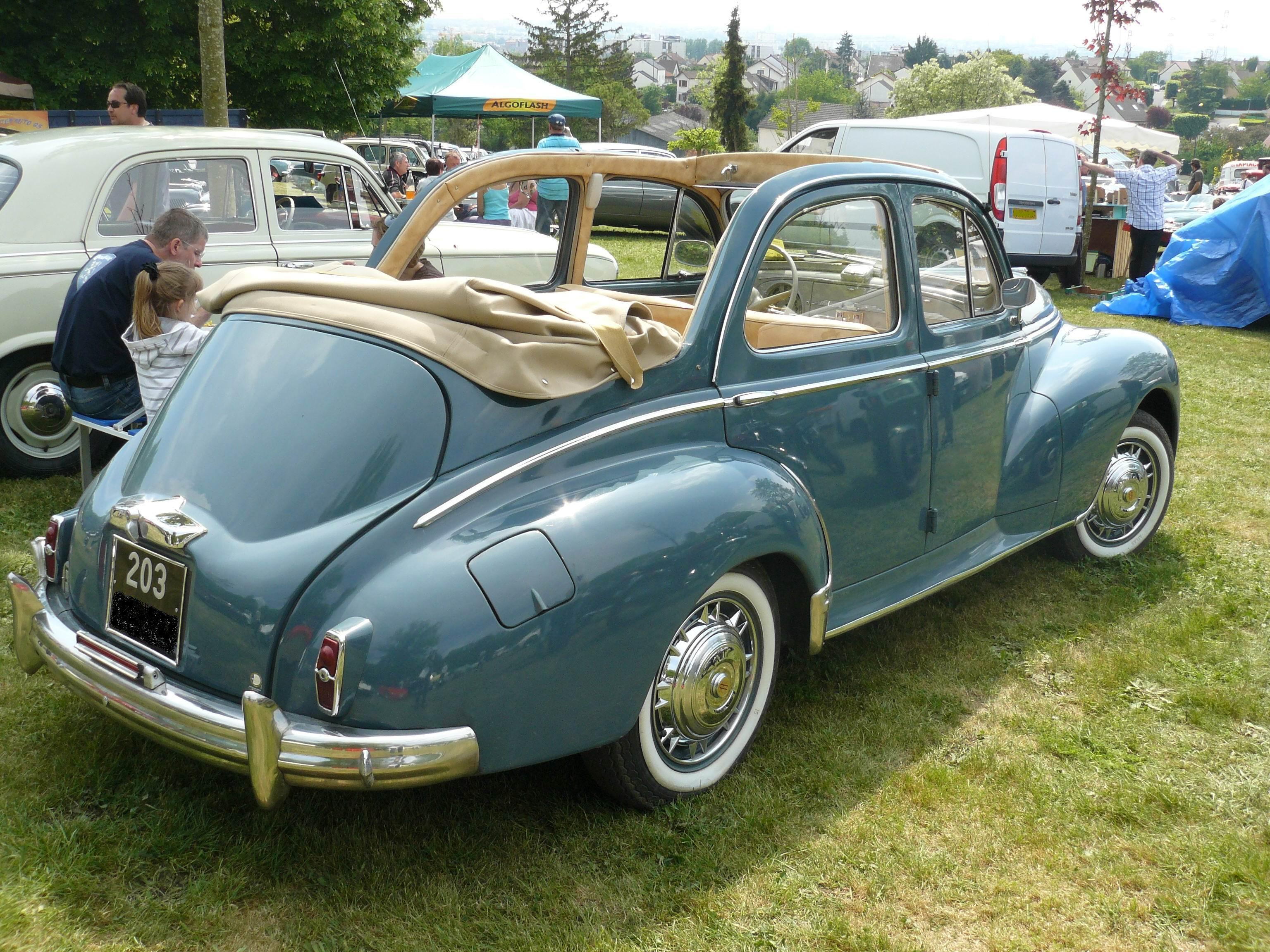 Jardinerie Laplace Mai 2011